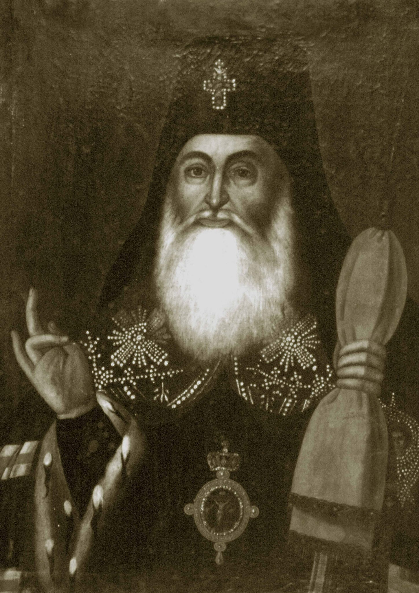 ანტონ I, XVIII საუკუნის ზეთის საღებავებით შესრულებული პორტრეტი.